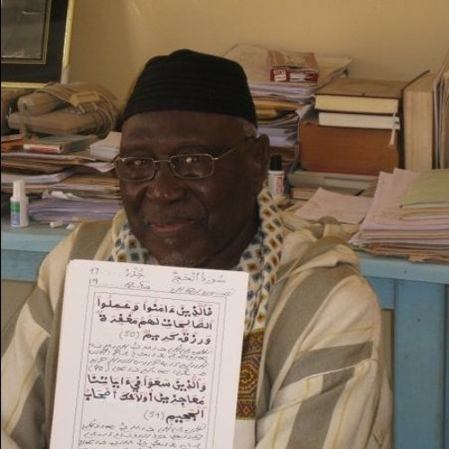 Professeur El Hadji Assane Faye dans son bureau, entouré de ses oeuvres.